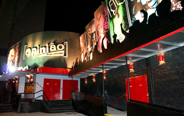 Vista de perfil do Bar Opinião, em Porto Alegre